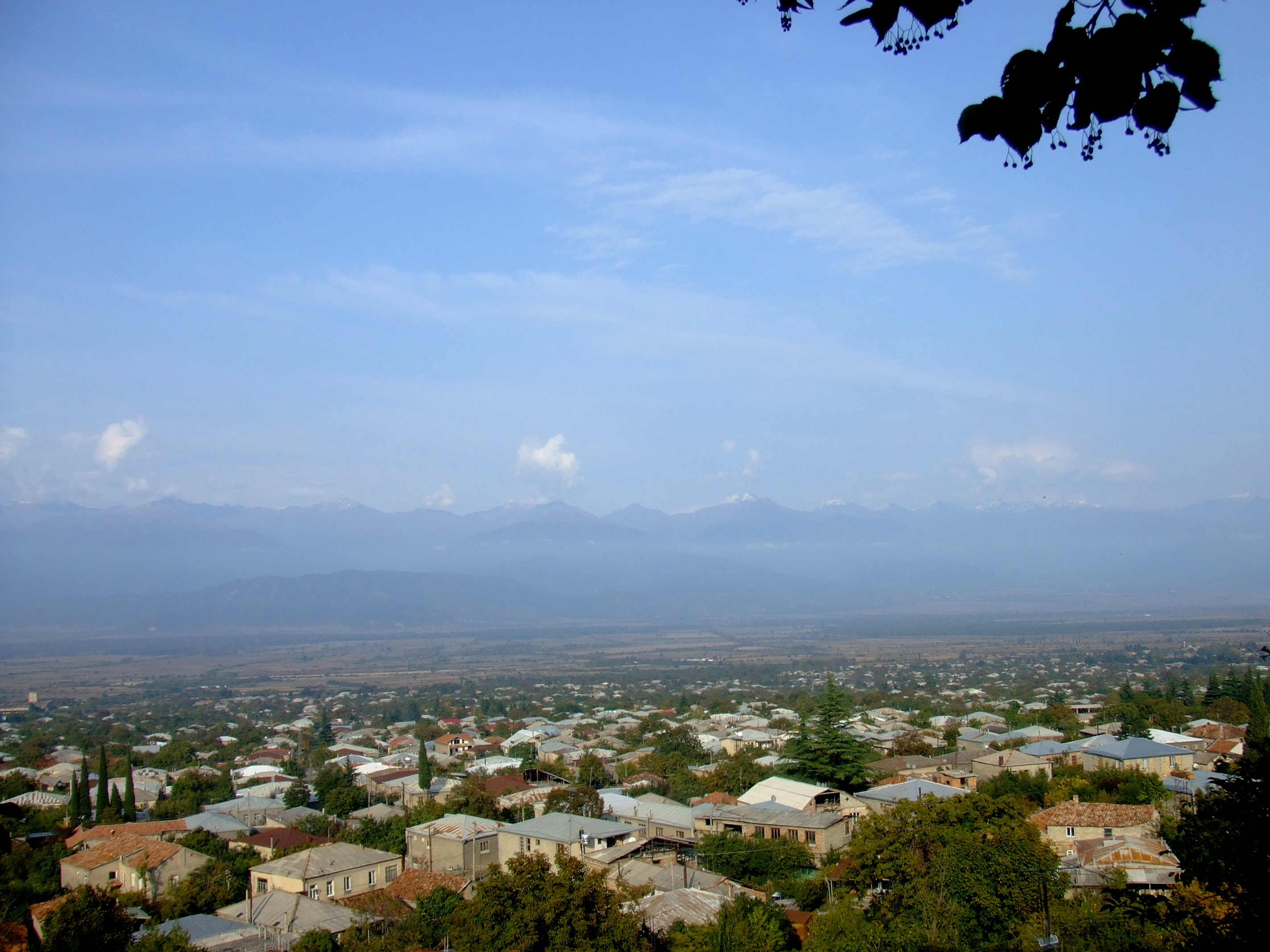 Telavi